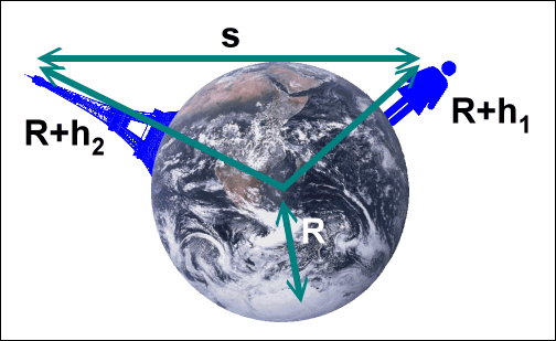 Schemazeichnung zur Berechnung der Begrenzung der Sichtweite durch die Erdkrümmung. Diagram supporting the explanation of limitation of visual range by curvature of earth. Siehe Sichtweite bzw. footprint. Related diagramm: Image:Visibcuhirp.png Zeichner: Anton (2006)